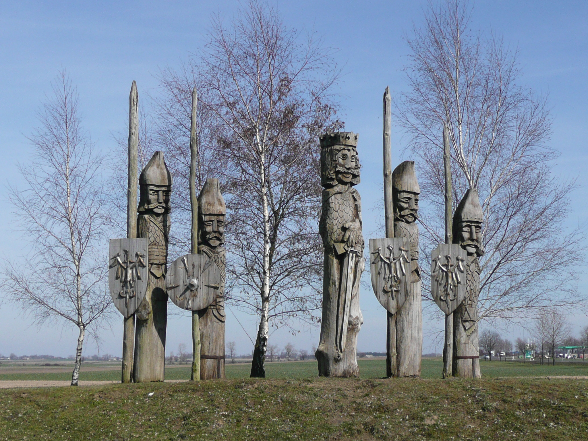 Wielkopolski Park Etnograficzny – drewniane figury przy drodze krajowej nr 5.